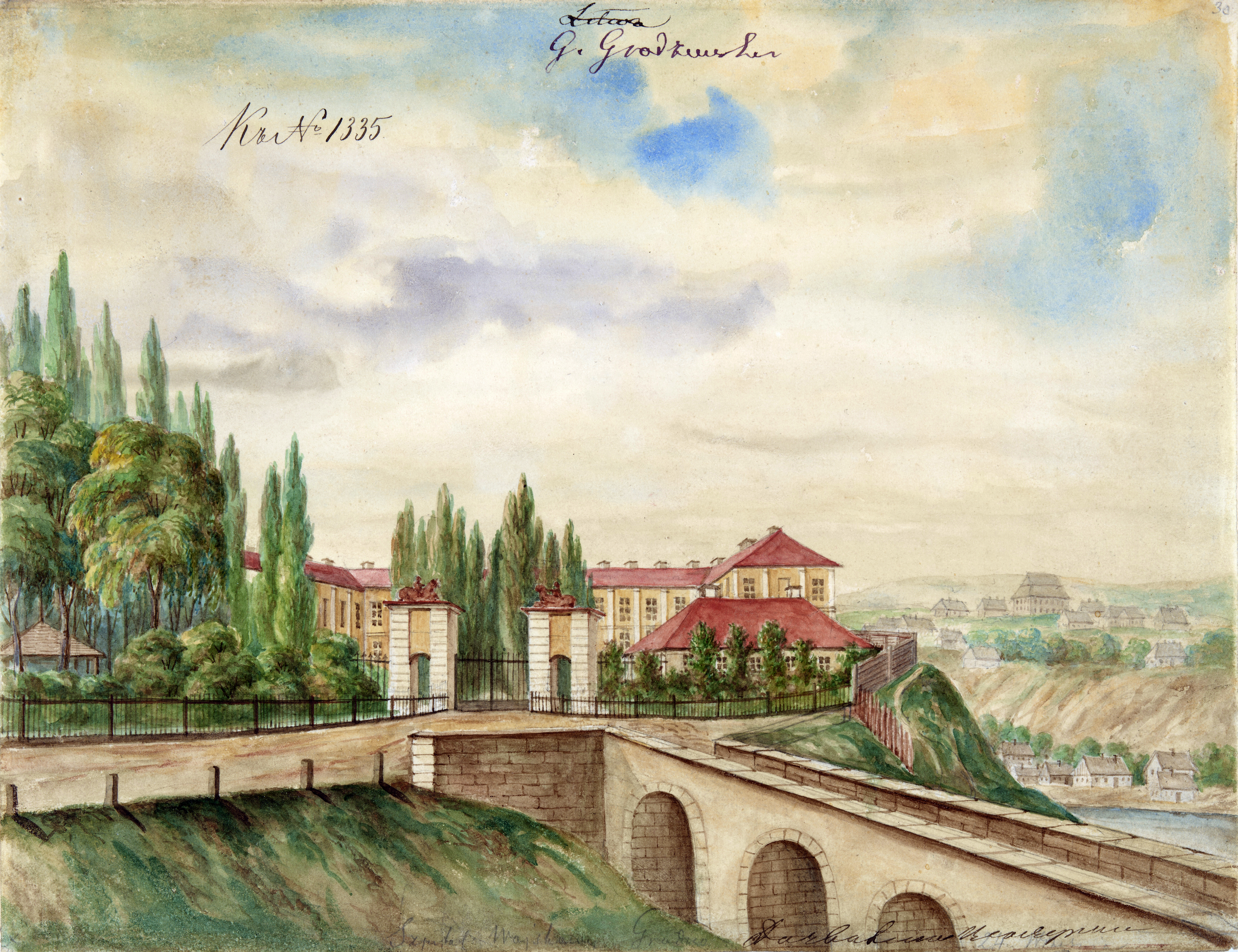 Гродна, Новы замак Беларуская (тарашкевіца): Горадня (Horadnia), Новы замак (Novy zamak)